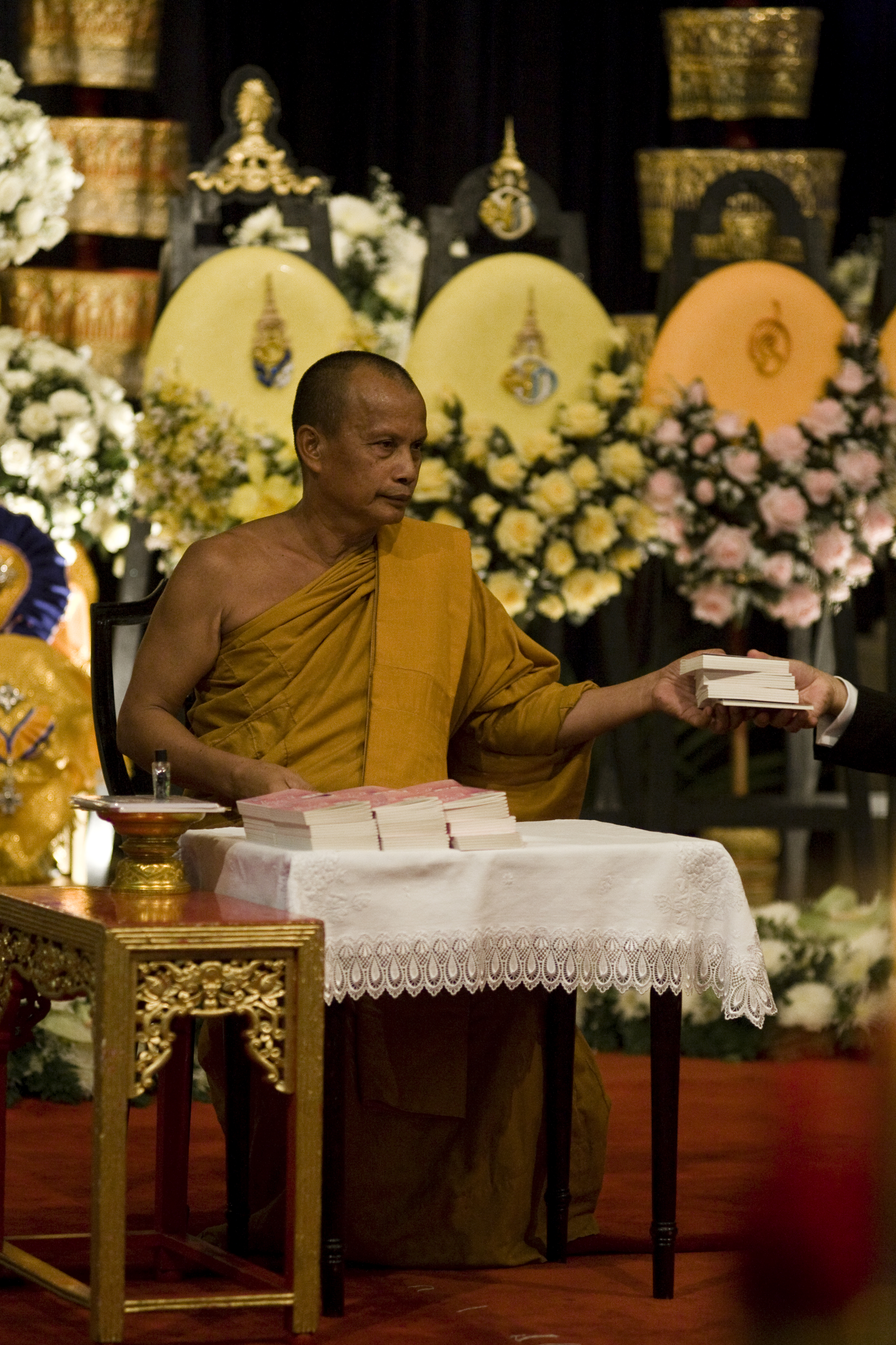 พระพยอม กัลยาโณ / นายกรัฐมนตรีและคณะรัฐมนตรี เป็นเจ้าภาพสวดพระอภิธรรมศพ นายสมัคร สุนทรเวช อดีตนายกรัฐมนตรี คนที่ 25 ณ ศาลาบัณณรศภาค วัดเบญจมบพิตร 14ธันวาคม2552 (The Official Site of The Prime Minister of Thailand Photo by พีรพัฒน์ วิมลรังครัตน์)